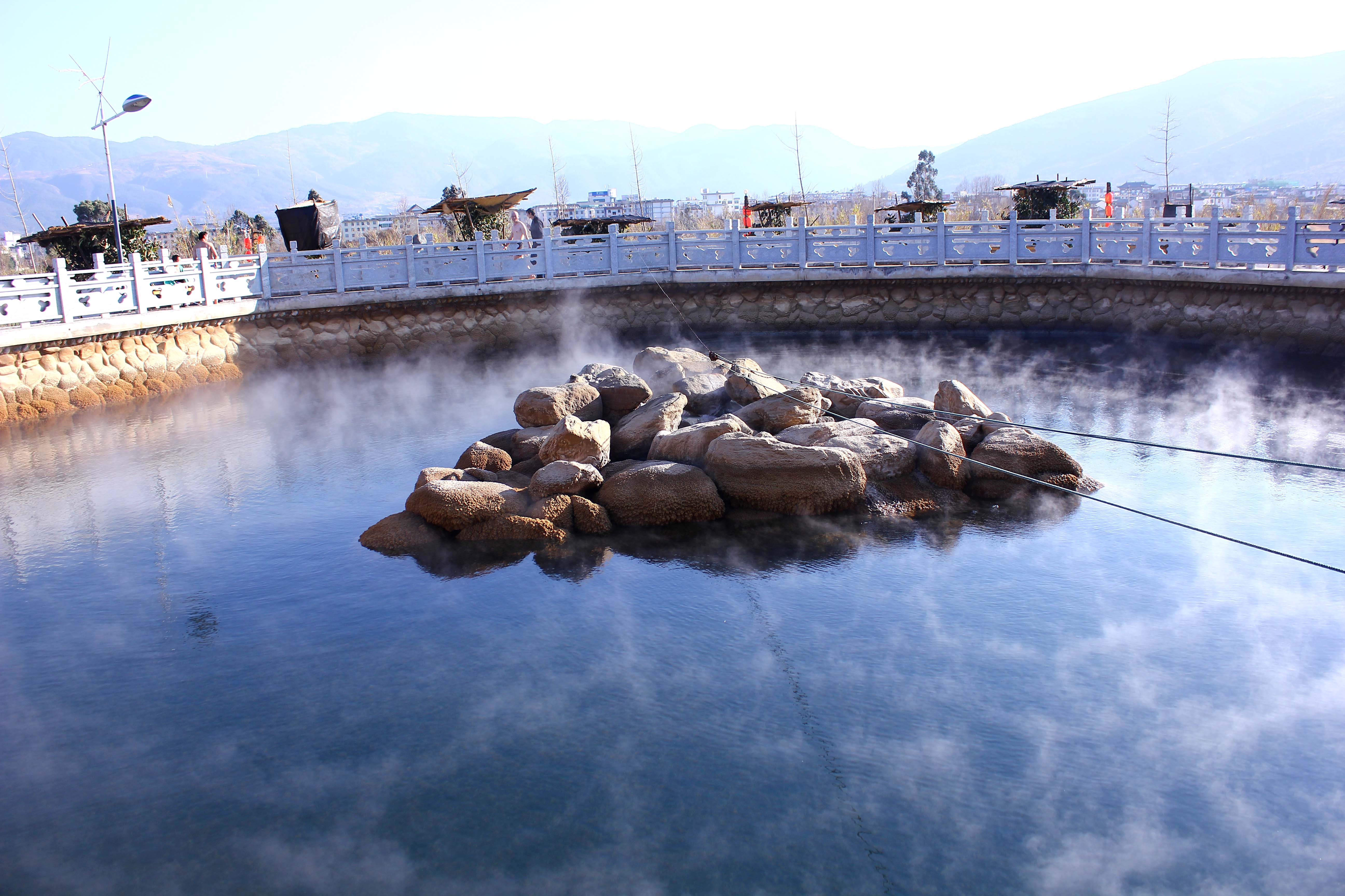 云南省洱源县大理地热国景区（位于茈碧湖南岸）内的“大滚锅”温泉